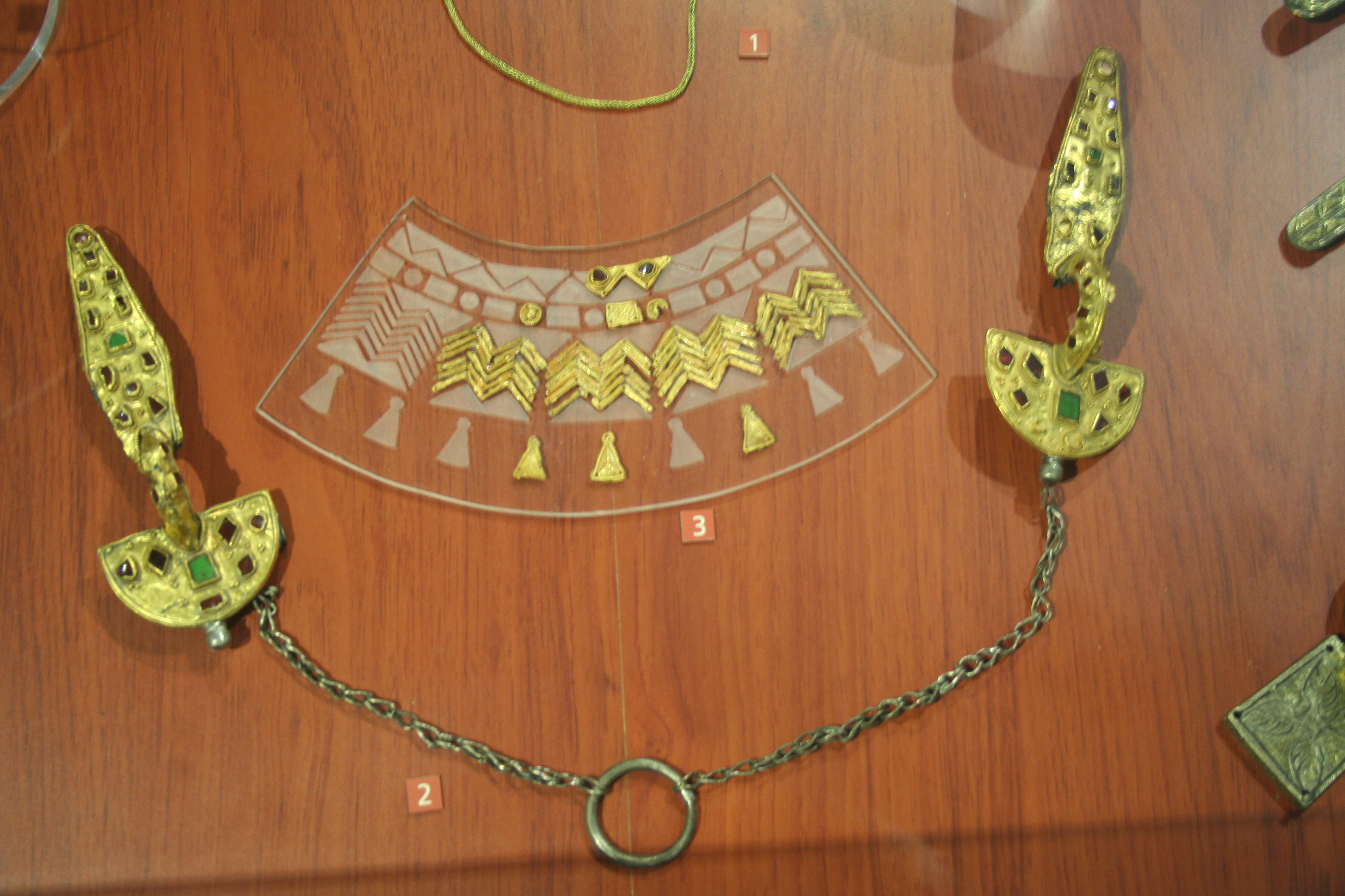 éléments du trésor d'Airan